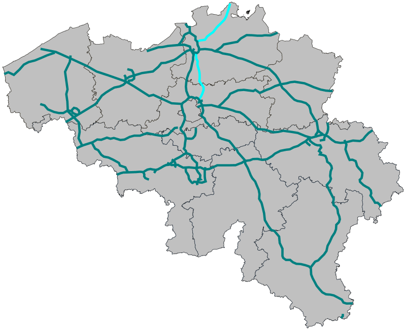 Traject A1 (België)